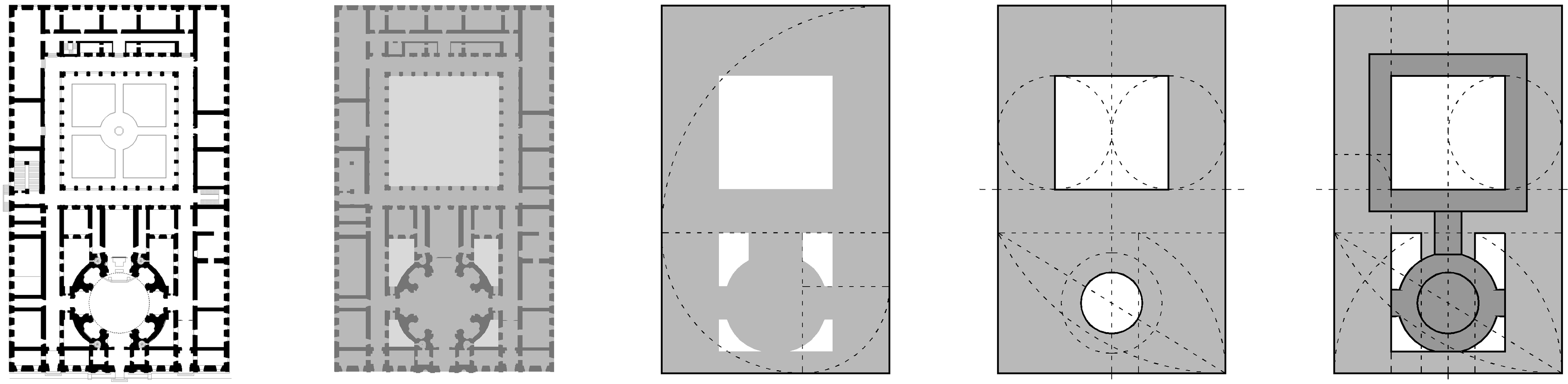 esquema del trazado de la planta del real colegio de los agustinos filipinos de valladolid, obra del arqto. ventura rodríguez, obtenido del autor de un articulo sobre el mismo.